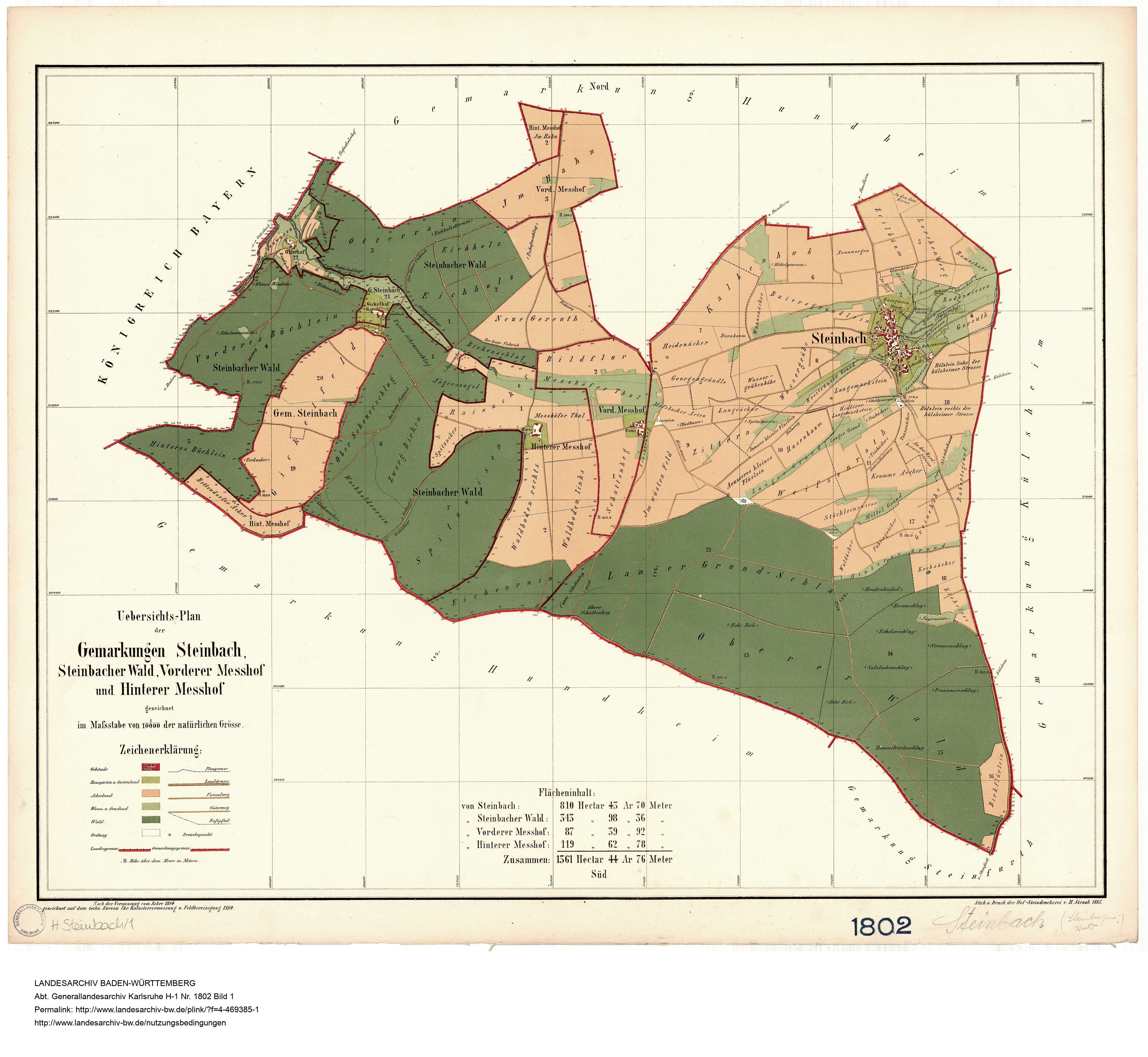 Gemarkungsplan Steinbach (Stadt Külsheim TBB), Steinbacher Wald, Vorderer Meßhof und Hinterer Meßhof von 1884 (Wüstungen Otterhof, Gickelhof)